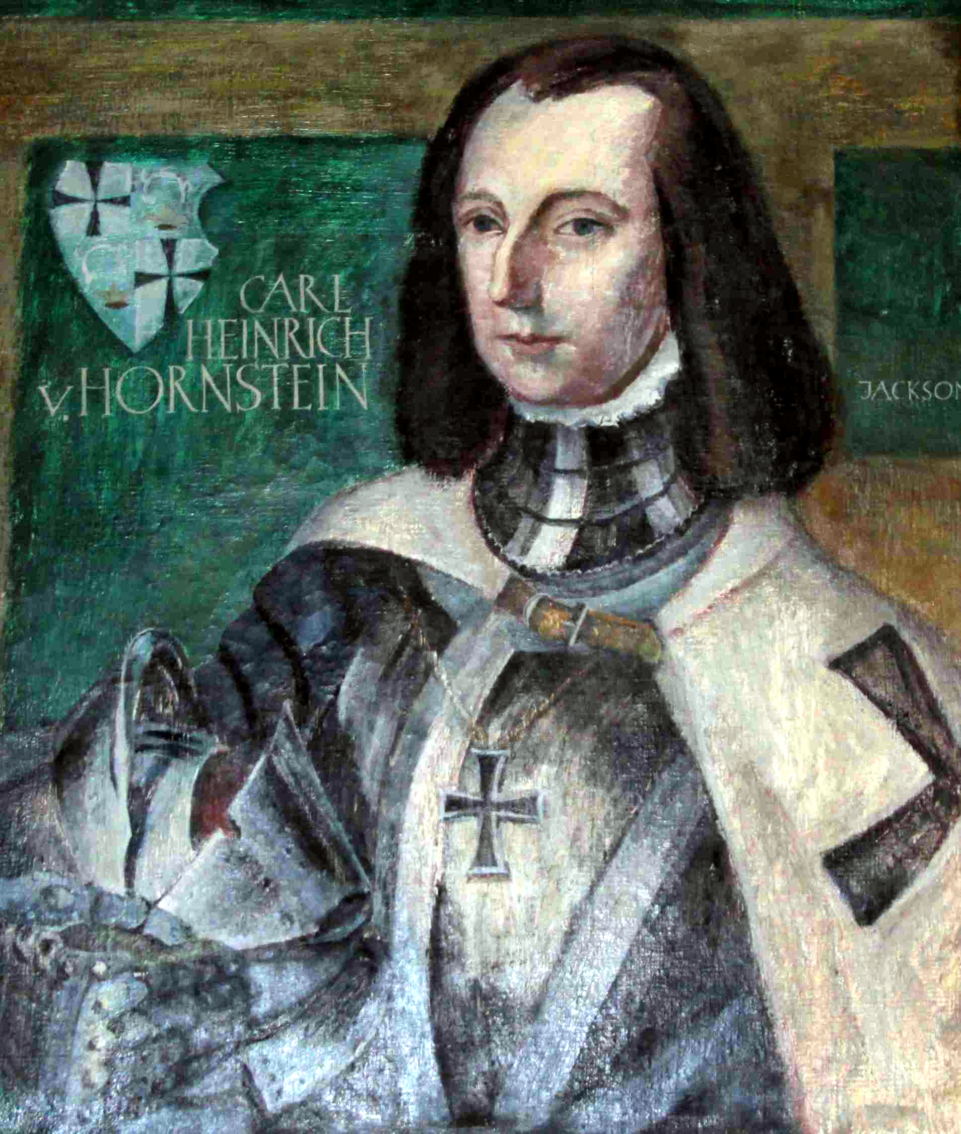 Hornstein